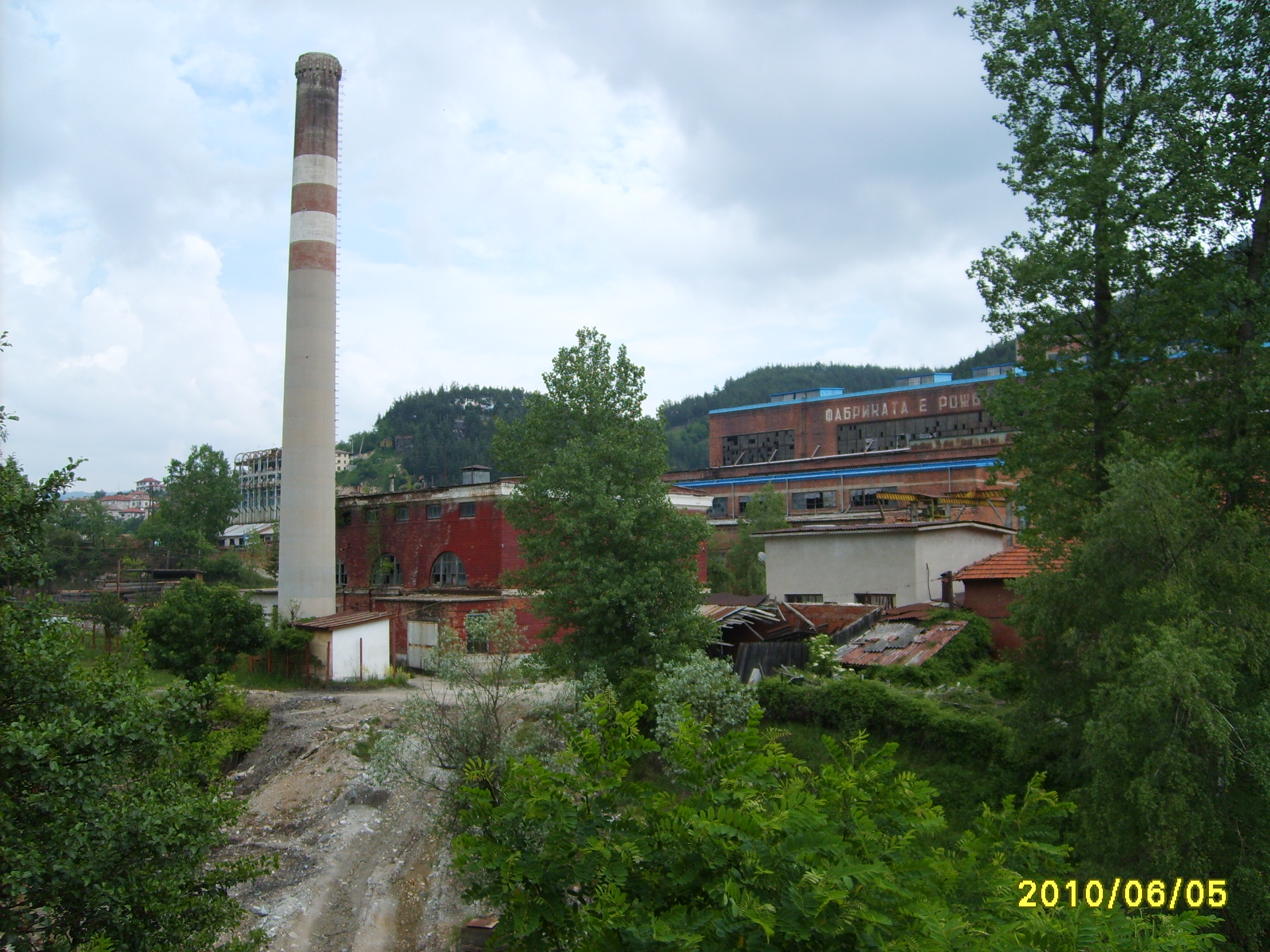 Фабриката в Рудозем.